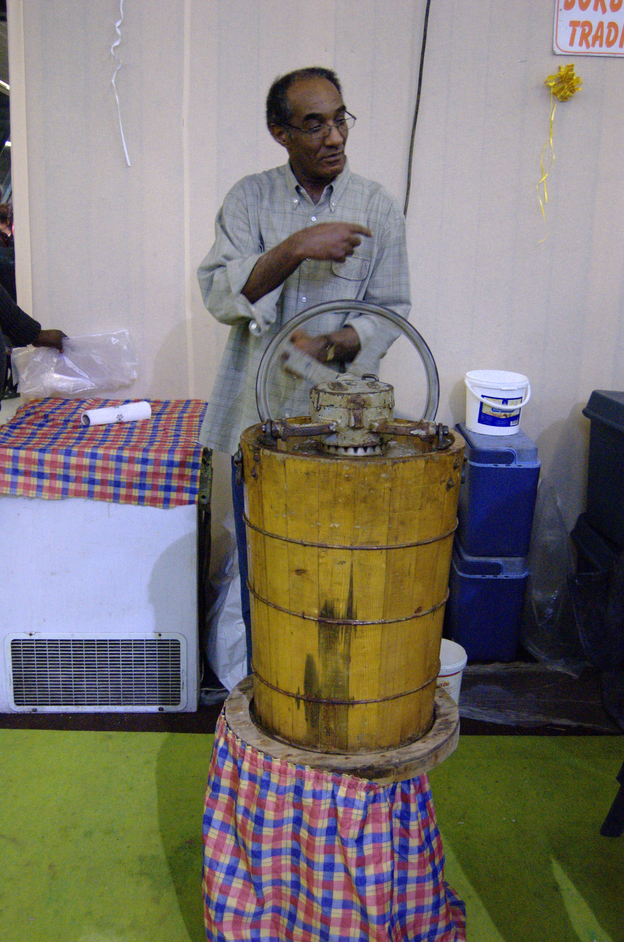 Manipulation de la machine à fabriquer le "sorbet coco" - Salon international de l'agriculture 2009 - Paris - France - 22 février 2009.